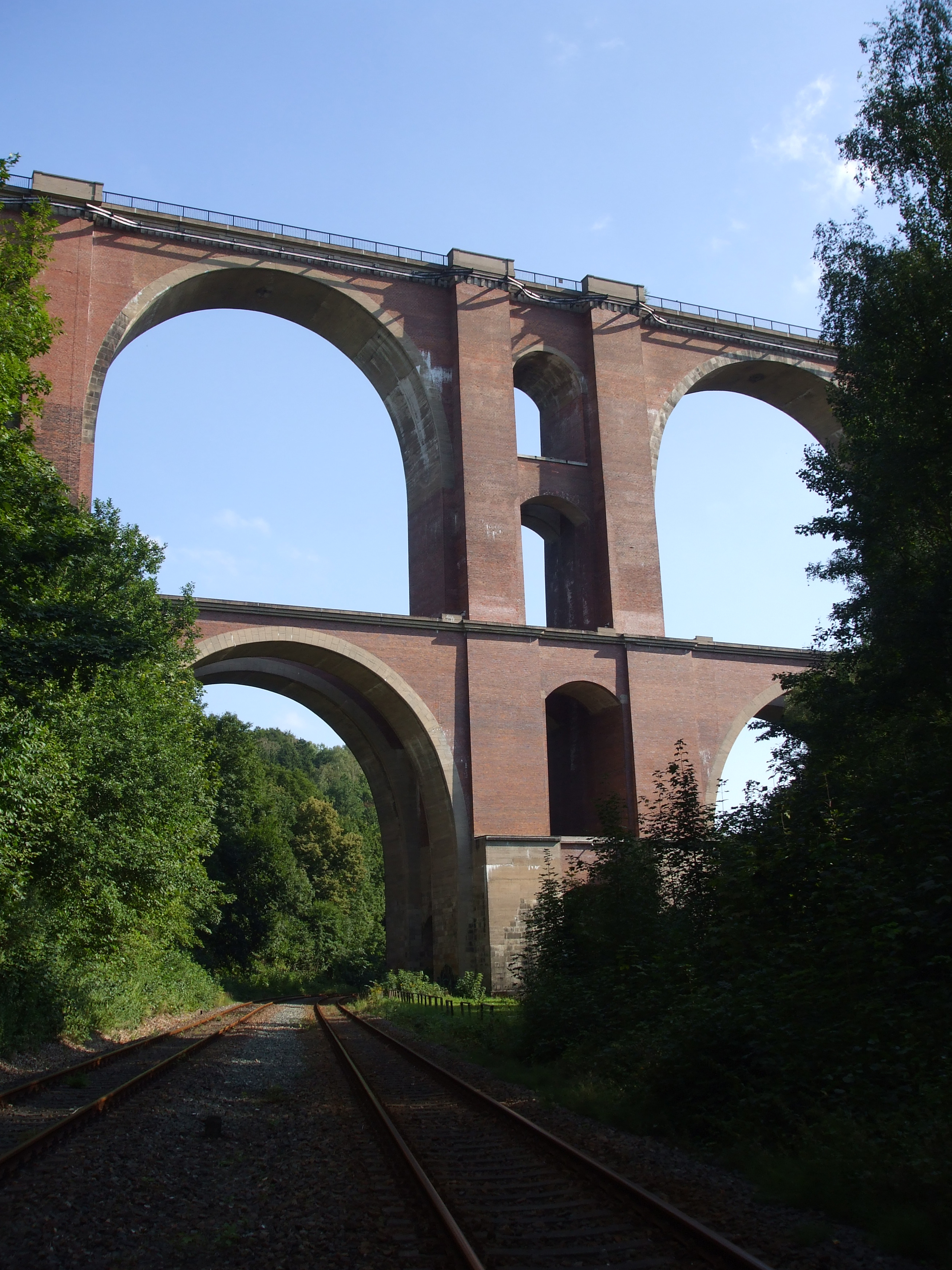 Elstertalbrücke